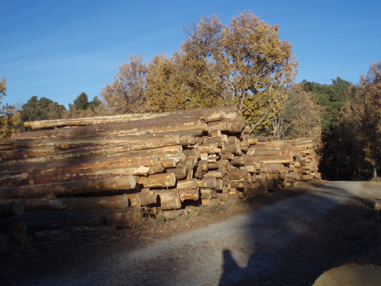 Madera del Valle de Valsaín (España).